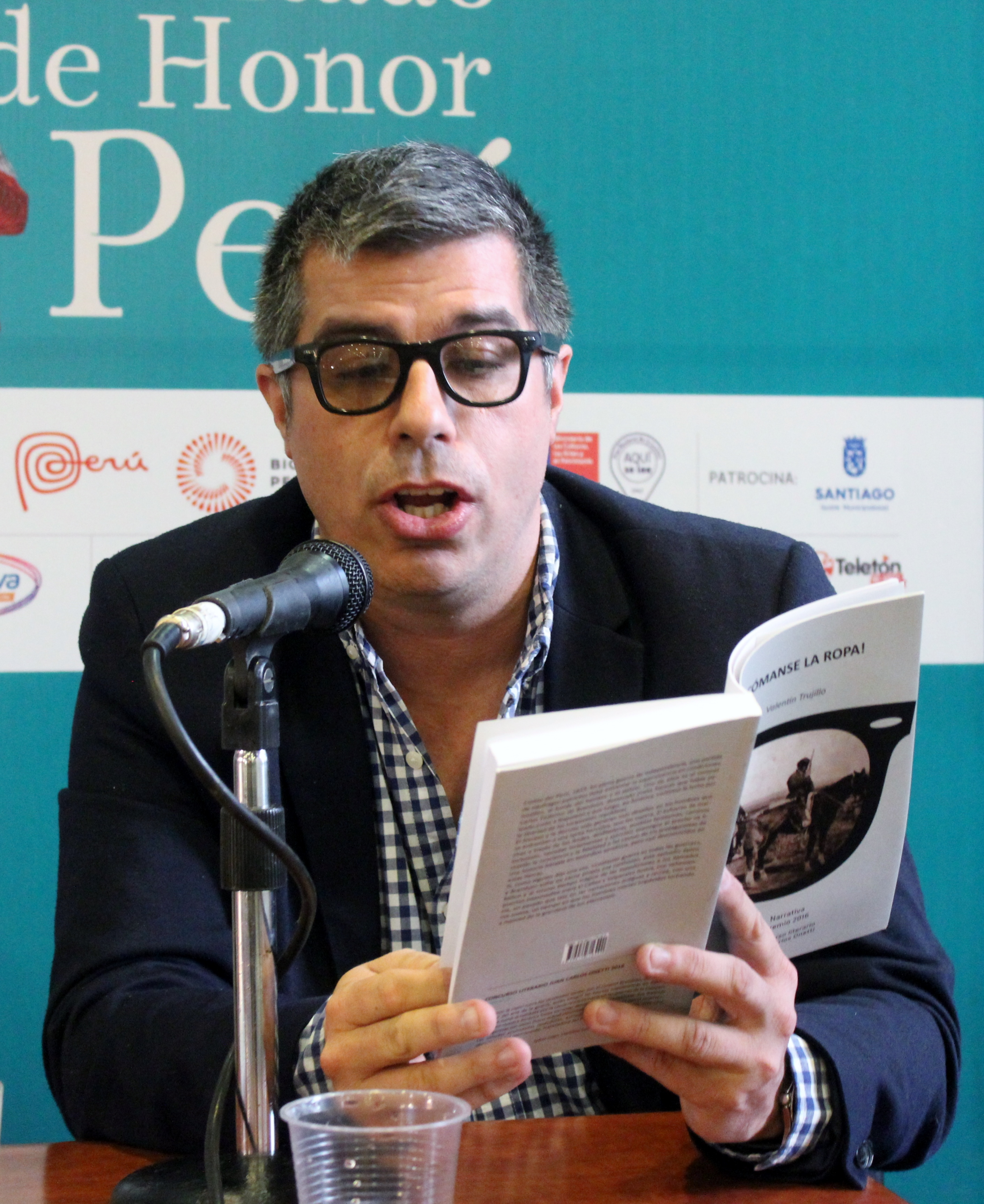 El periodista y escritor uruguayo Valentín Trujillo lee un fragmento de su libro Cómanse la ropa durante la mesa Nuevas voces de la narrativa latinoamericana: Lectura de escritores Bogotá 39 celebrada en el marco de la Feria Internacional del Libro de Santiago 2018 (2 de noviembre).